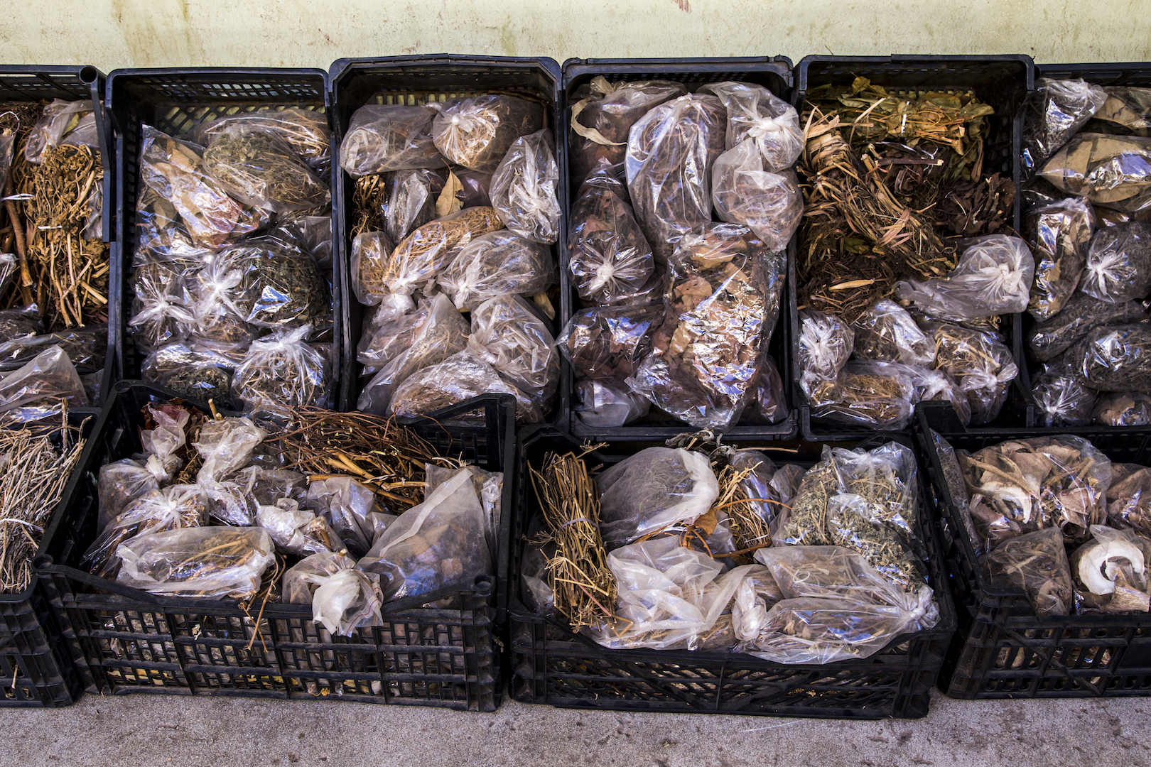 Herboristerie traditionnelle, Mindelo, Cap Vert This is an image of "African people at work" from Cape Verde